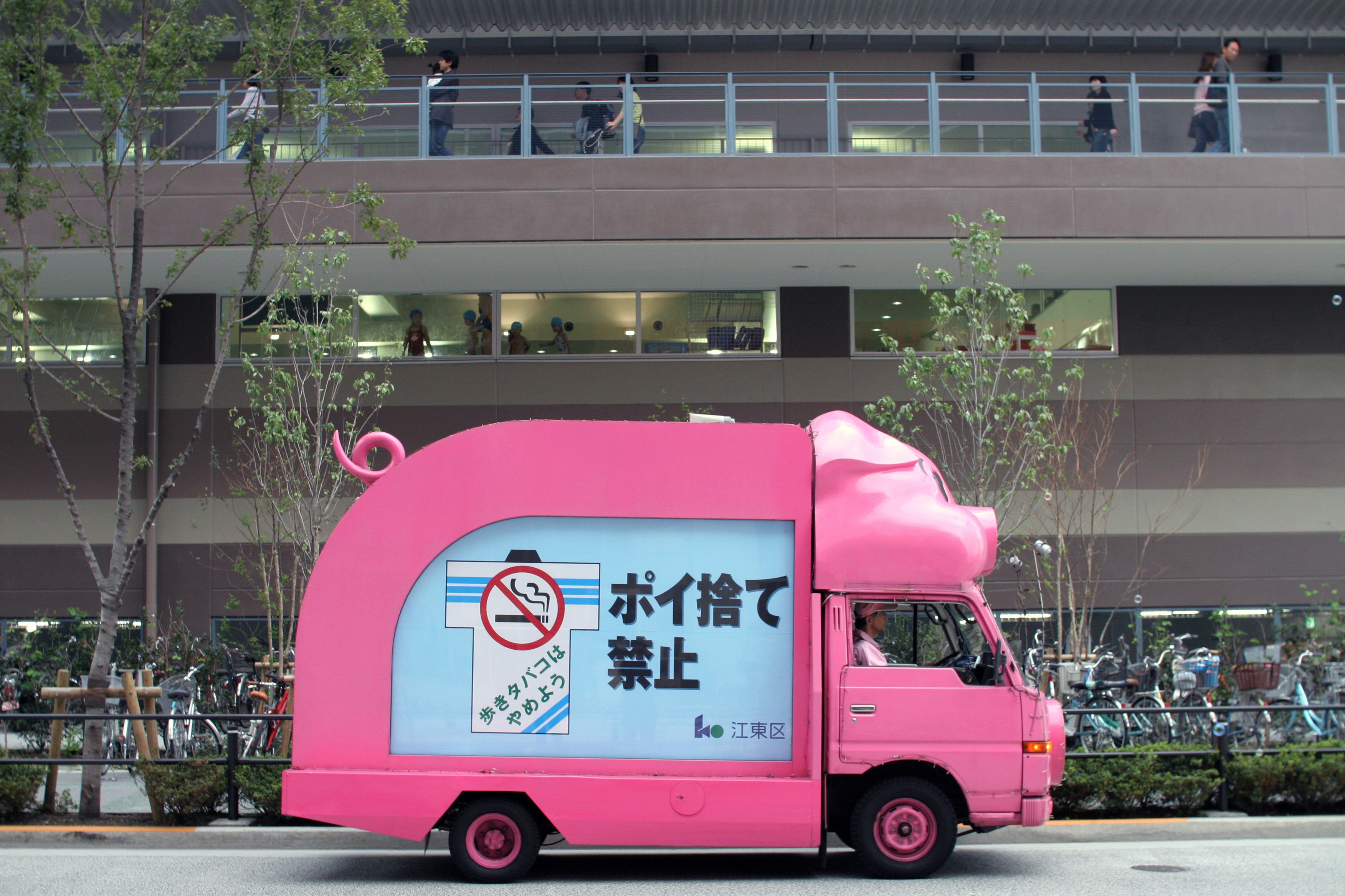 Toyosu, Tokyo Japan